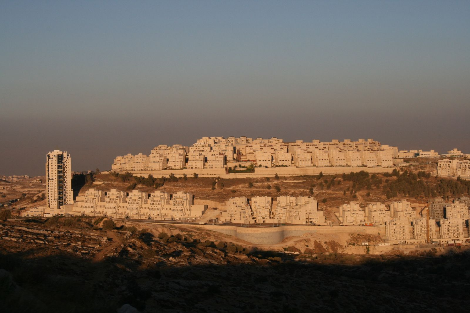 Linda panorámica de la colonia judía de Har Homa, cerca de Belén. Este era un monte arbolado no hace muchos años...